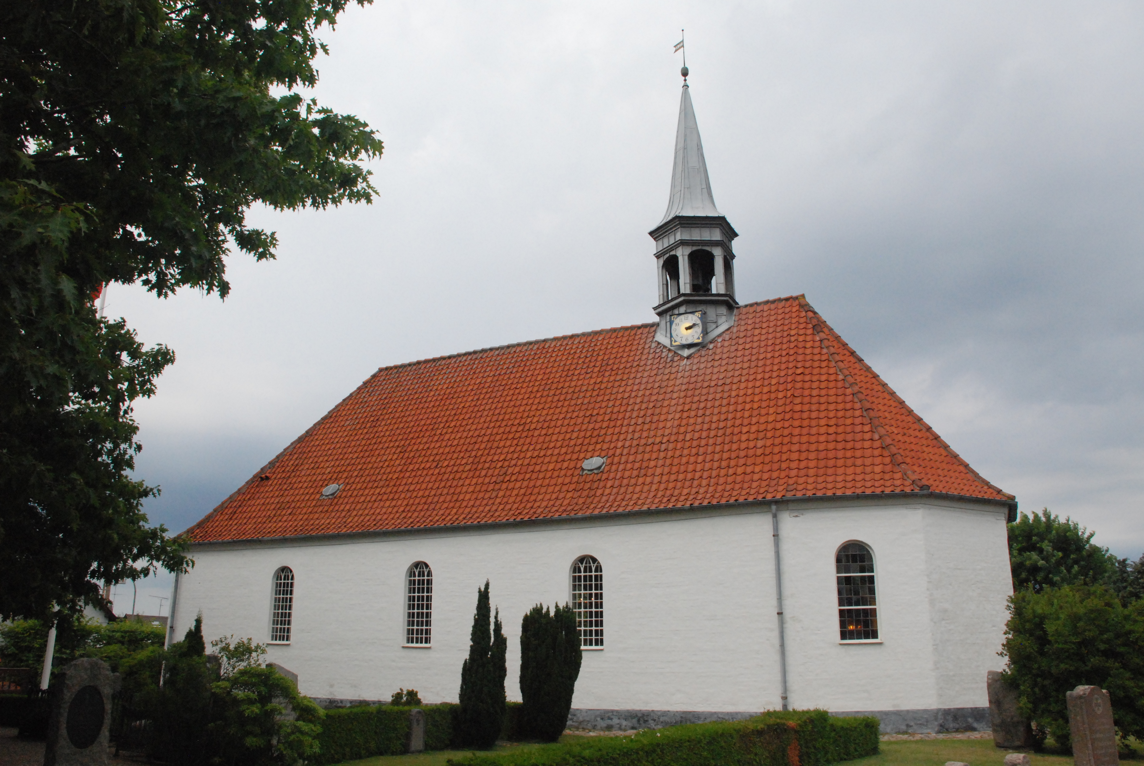 Gilleleje Kirke, Gilleleje Sogn, Holbo Herred, Frederiksborg Amt, Danmark.